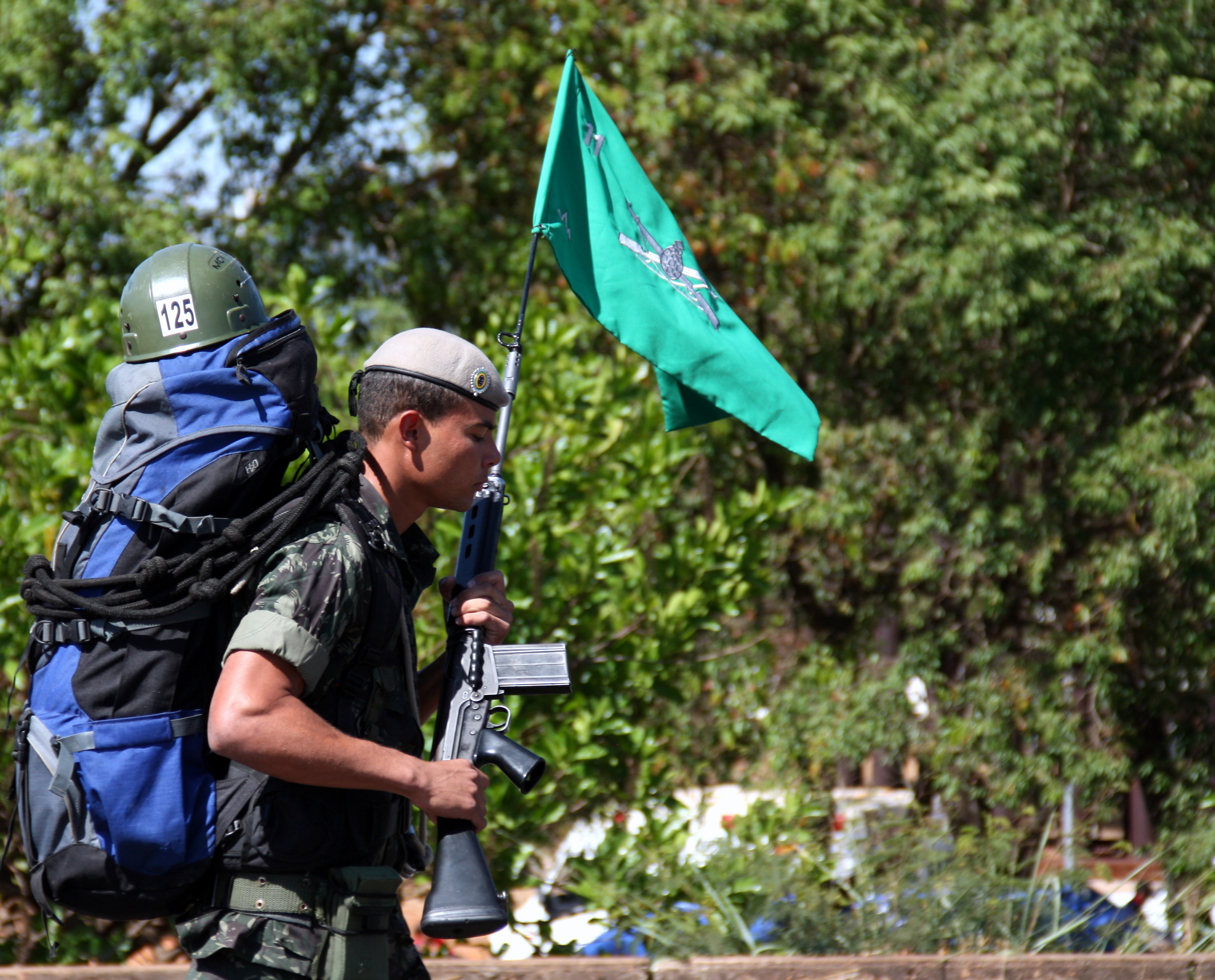 Exército Brasileiro